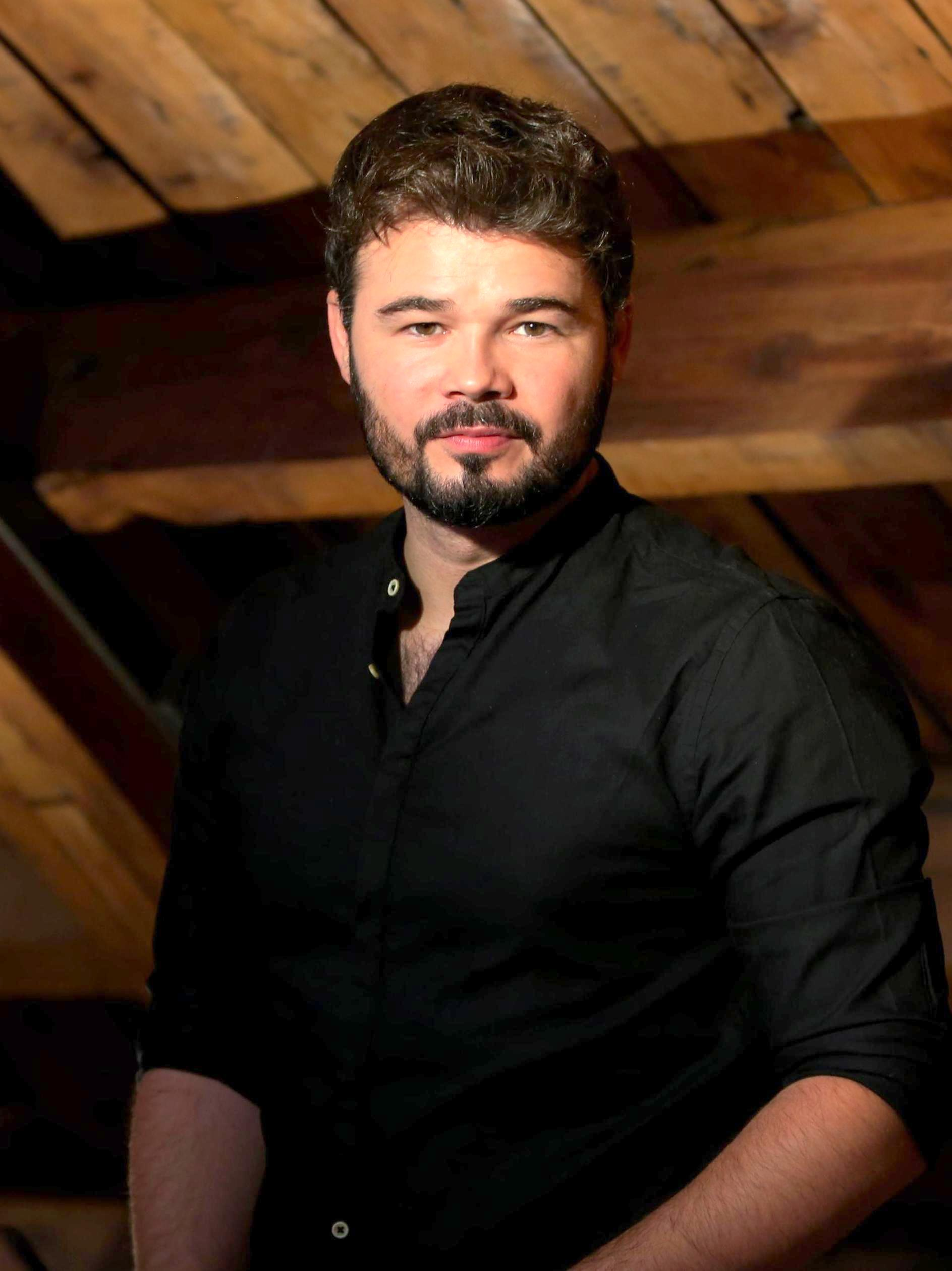 Gabriel Rufián, Diputado de ERC.